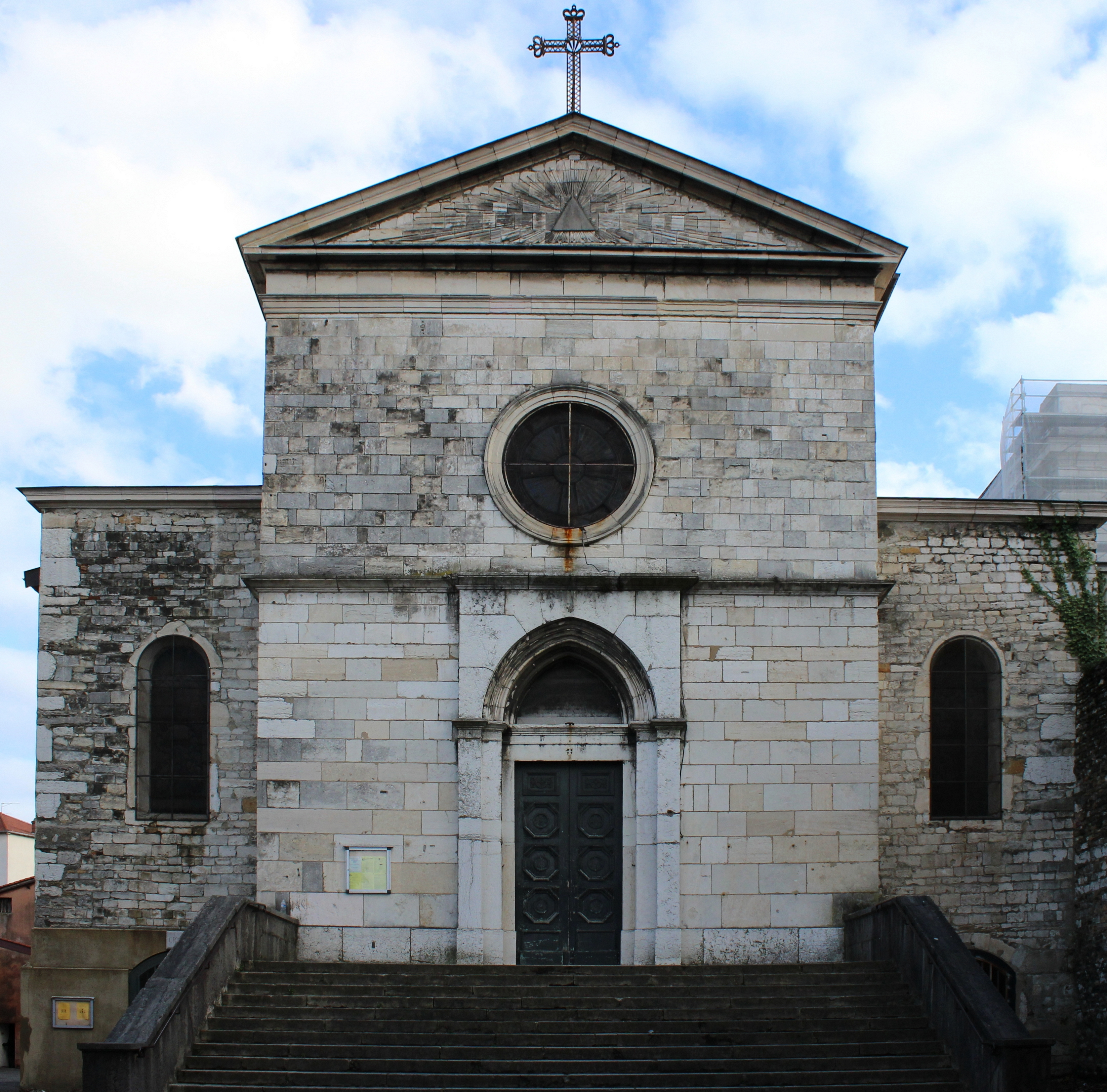 L'église Saint-Irénée à Lyon.